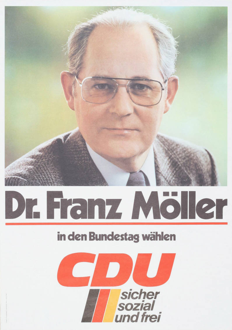 Dr. Franz Möller in den Bundestag wählen CDU sicher sozial und freiAbbildung:PorträtfotoKommentar:Datierung unsicherPlakatart:Kandidaten-/Personenplakat mit PorträtAuftraggeber:CDU-Bundesgeschäftsstelle, Abt. Öffentlichkeitsarbeit, BonnObjekt-Signatur:10-001: 2672Bestand:Plakate zu Bundestagswahlen (10-001)GliederungBestand10-18:Plakate zu Bundestagswahlen (10-001) » Die 10. Bundestagswahl am 6. März 1983 » CDU » Mit PorträtfotoLizenz:KAS/ACDP 10-001: 2672 CC-BY-SA 3.0 DE